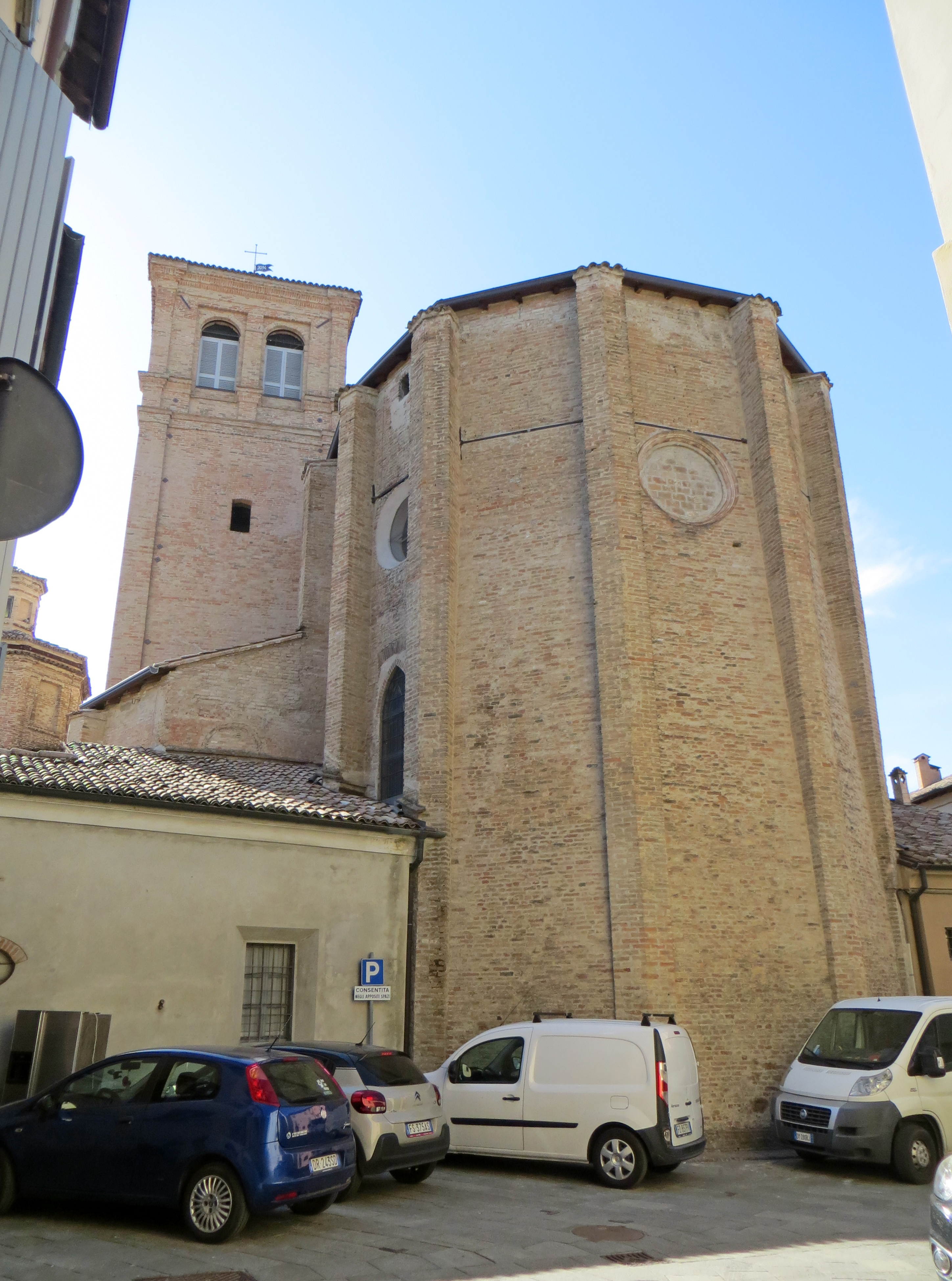 Duomo di Santa Margherita (Colorno) - abside e campanile